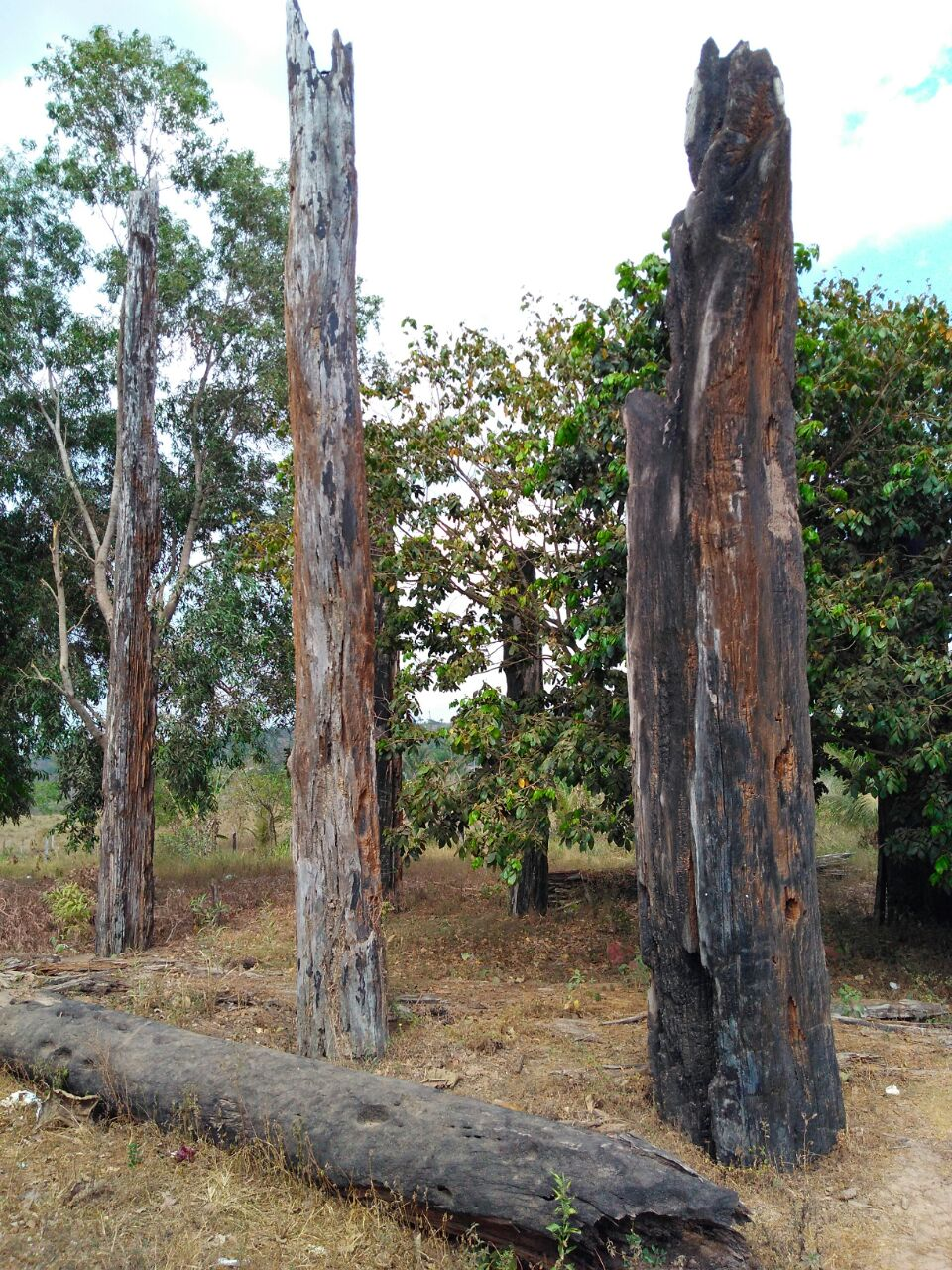 O Monumento das Castanheiras Mortas é um monumento em Eldorado do Carajás, que foi inaugurado em 17 de abril de 1999. São 19 castanheiras queimadas e mortas que foram erguidas na curva do S da BR-155, local onde ocorreu o massacre, em homenagem tanto aos trabalhadores mortos, quanto ao monumento de Niemeyer derrubado em 1996.